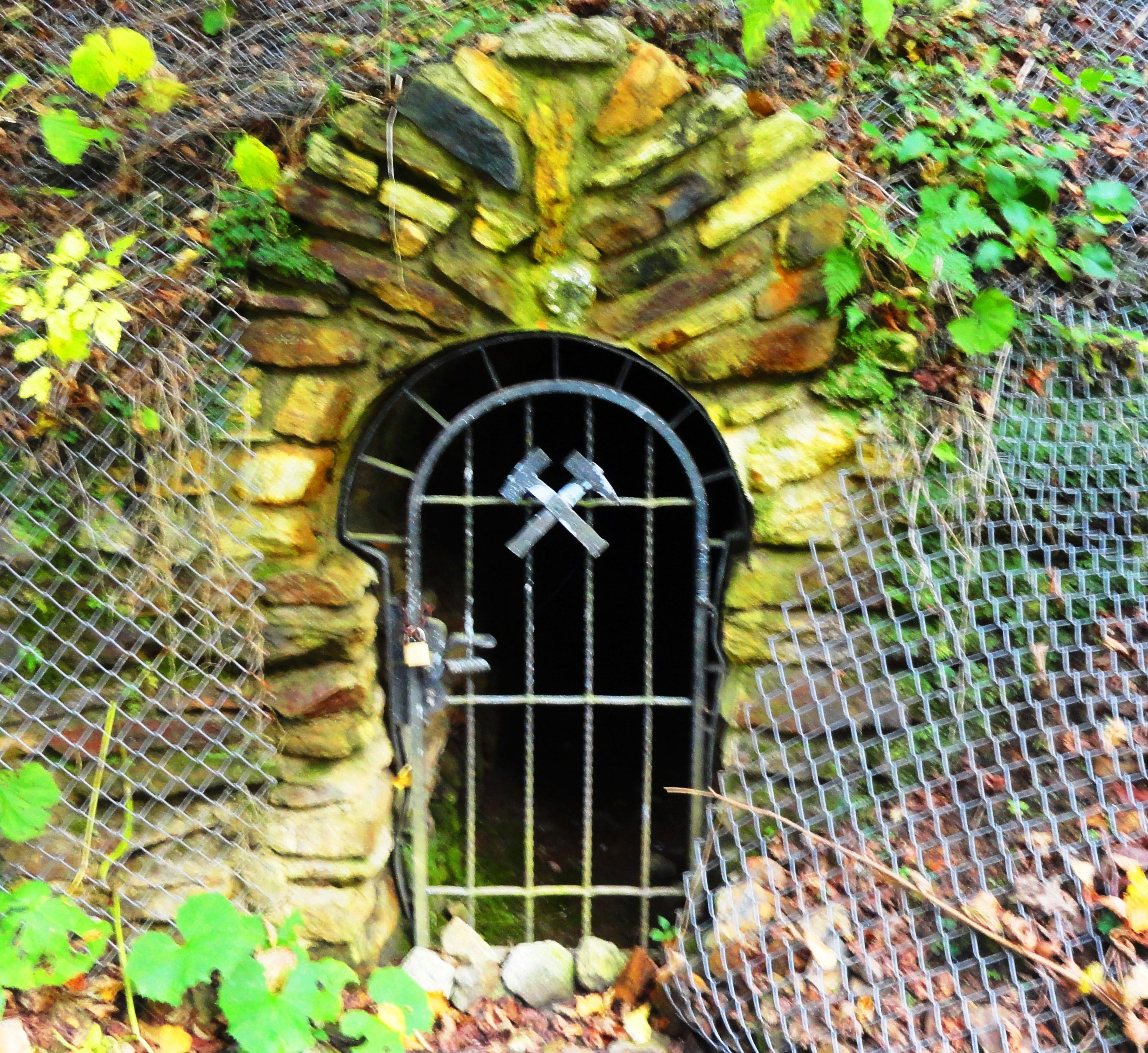 Bergbau Waldenstein, Wolfsberg, Kärnten